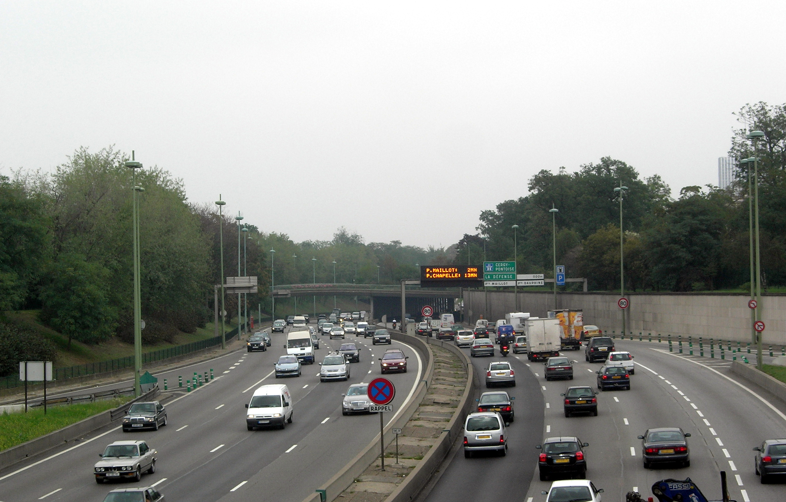 Description =Boulevard périphérique photographié depuis un pont porte de la Muette Source =Photo taken by Remi Jouan Date =Septembre 2006 Author =Remi Jouan